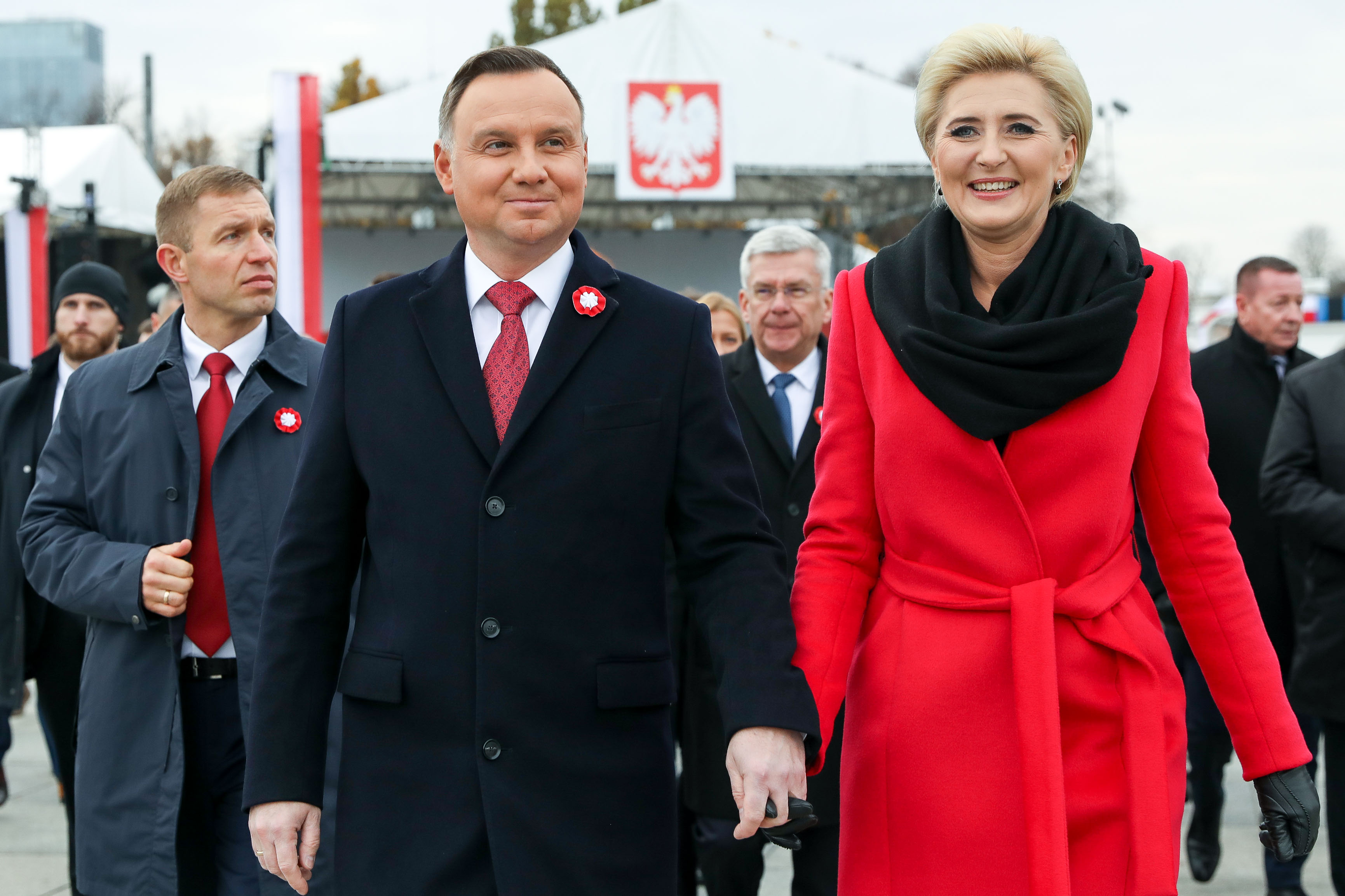 Para Prezydencka podczas Narodowego Święta Niepodległości 11.11.2019 r. Fot.: Jakub Szymczuk